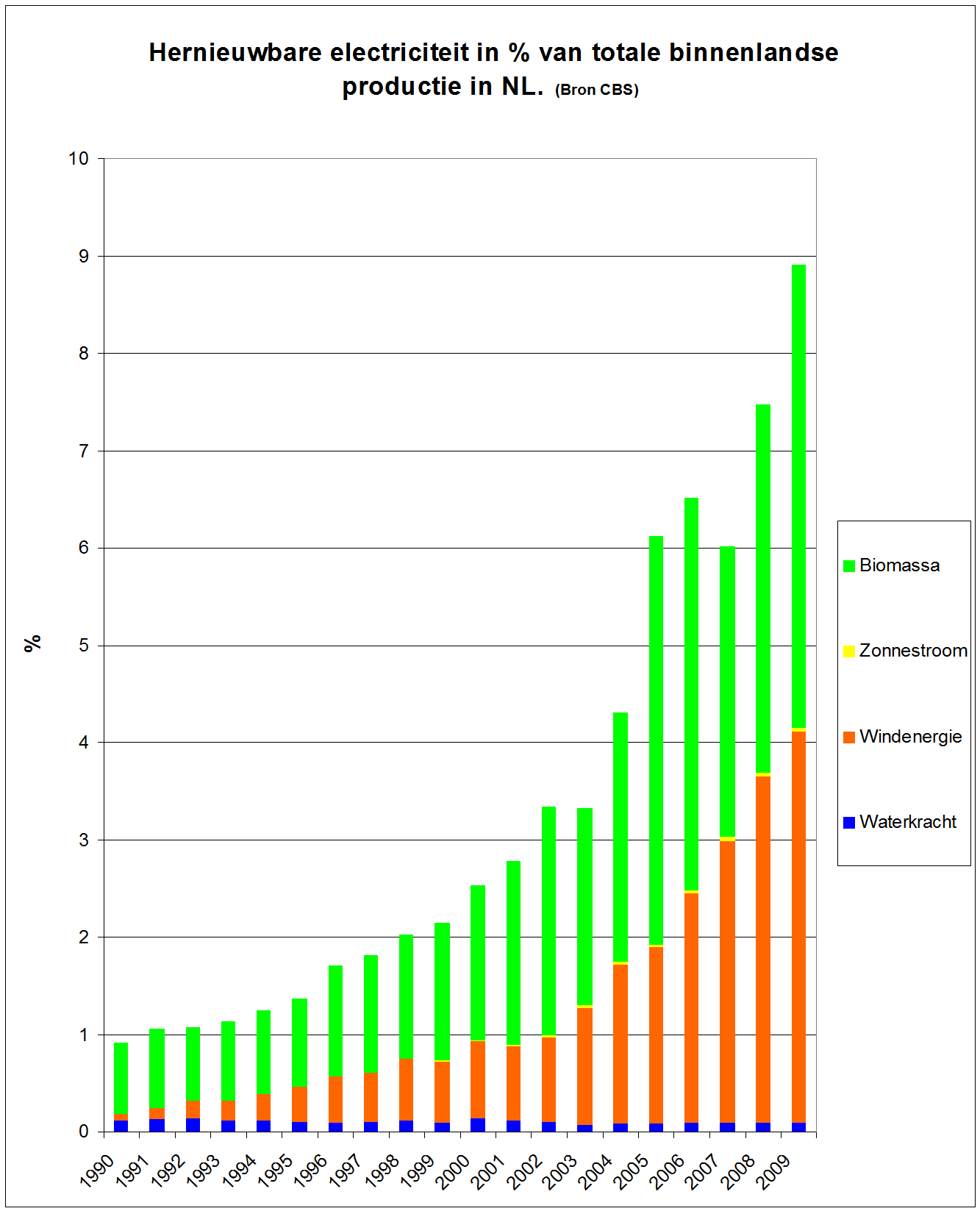 Grafiek gebaseerd op gegevens van CBS. Zie